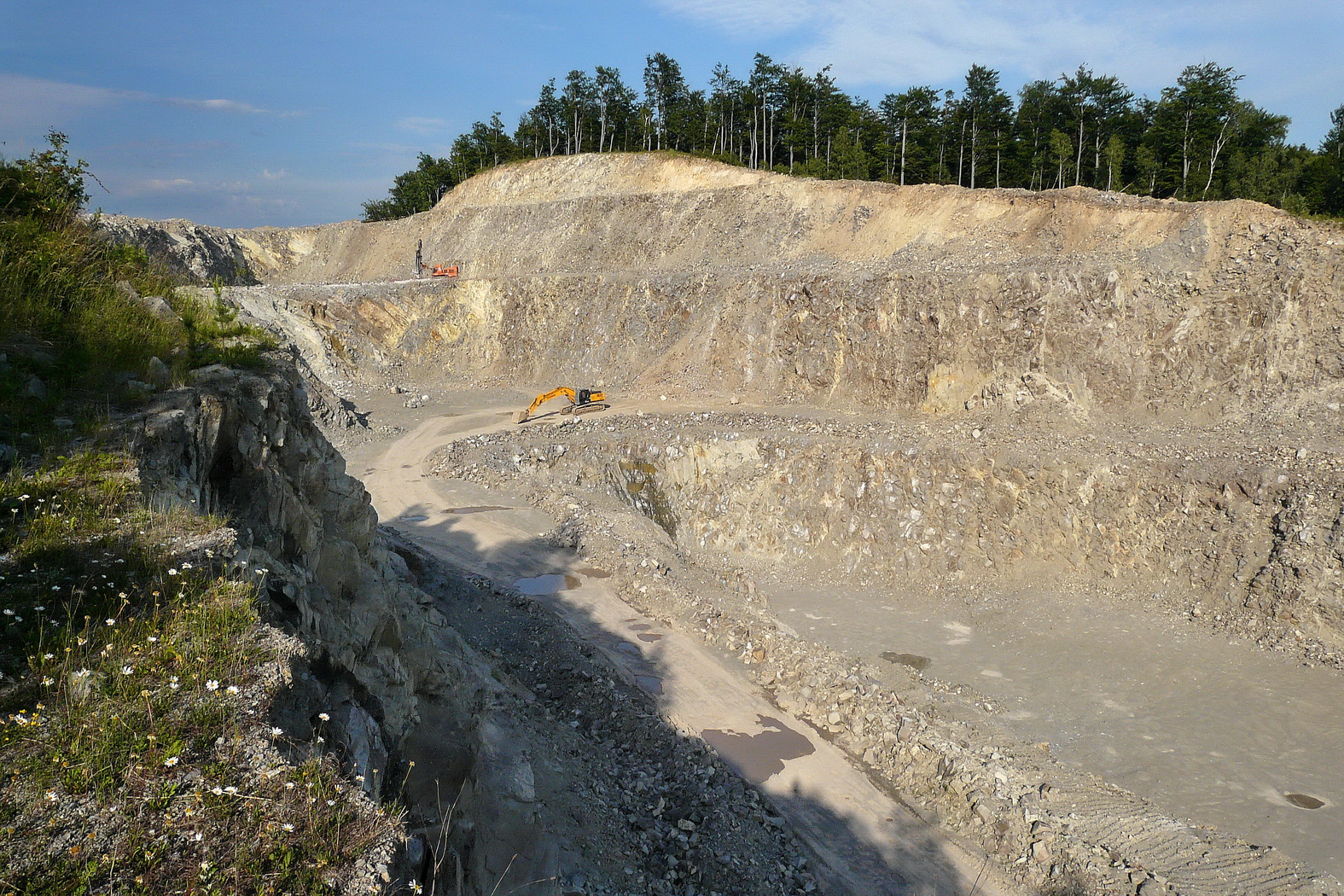 Lom znělce na Maršovickém vrchu